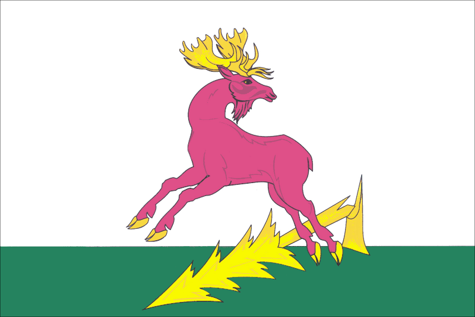 Флаг Алексеевского района, Татарстан, Россия